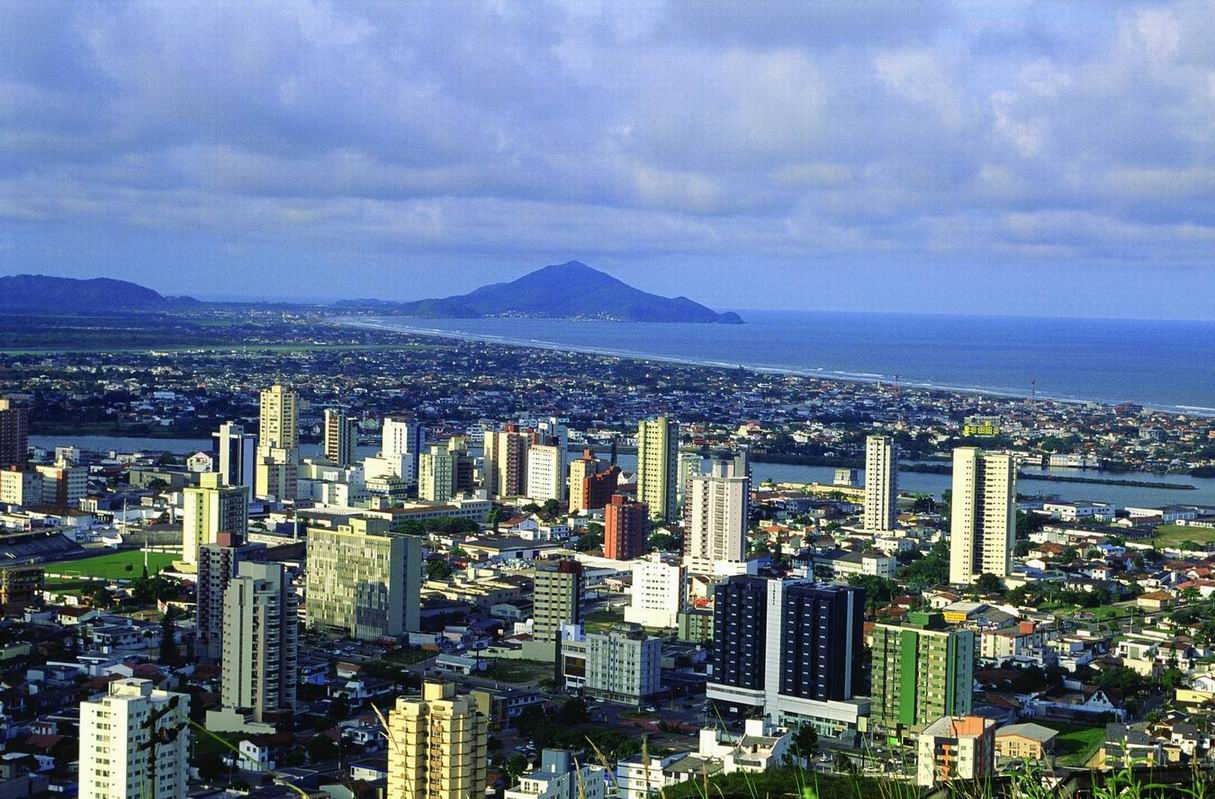 Panoramica da cidade vista do alto do morro da cruz localizado no bairro fazenda próximo ao centro da cidade